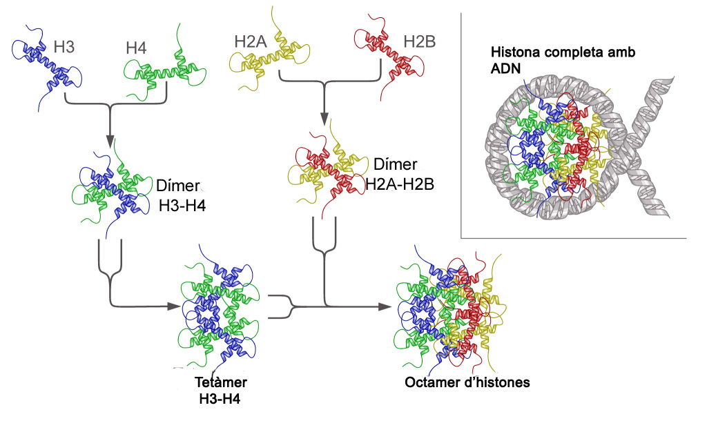 Estructura del nuclosoma.jpg